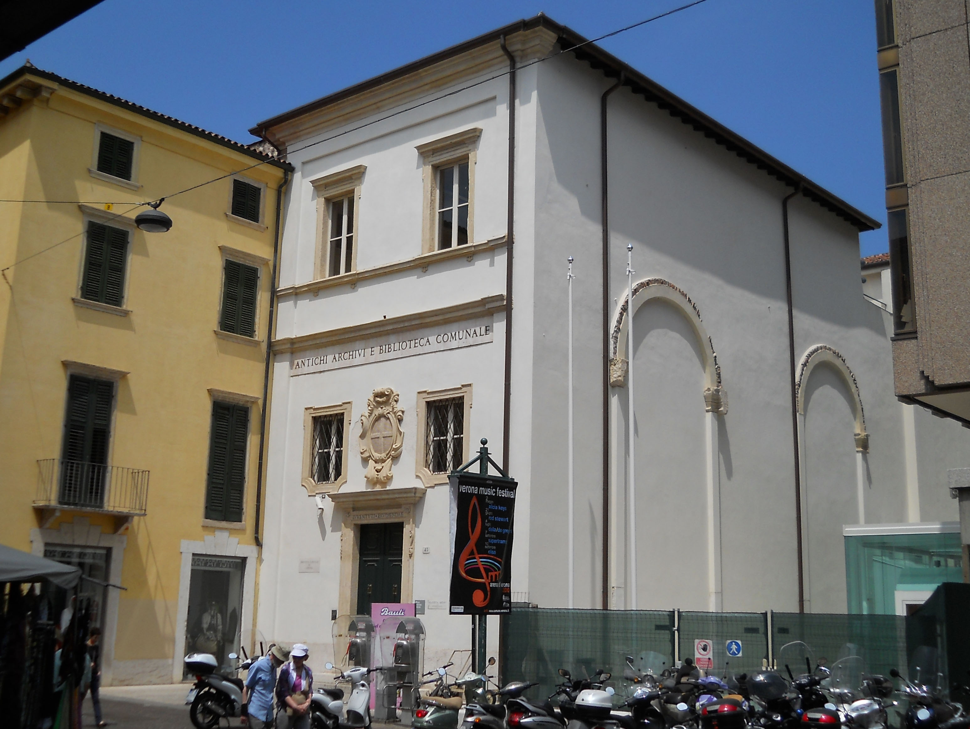 Facciata della biblioteca civica di Verona